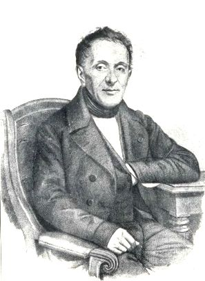 Photographie d’un portrait de Bernard Lorentz, gravé en 1859, à la suite d’une souscription ouverte parmi les amis de Lorentz sur l’initiative de M. de Buffévent, alors conservateur des forêts en retraite